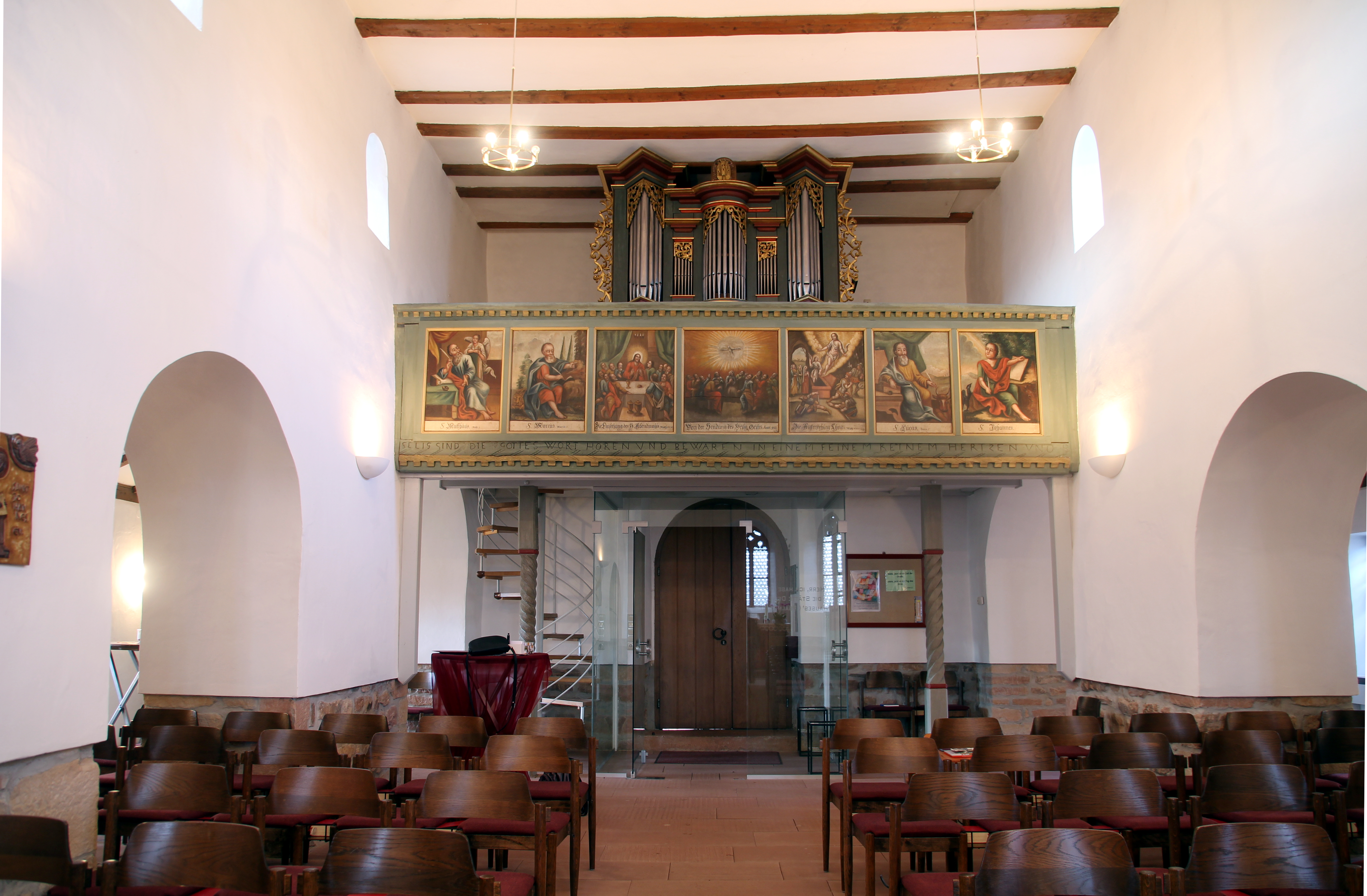 Evangelische Kirche Odenhausen (Lahn), Landkreis Gießen, Hessen, Deutschland